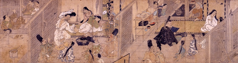 Emaki de l'Histoire d'un peintre datant de l'époque de Kamakura. Détail de la première peinture.